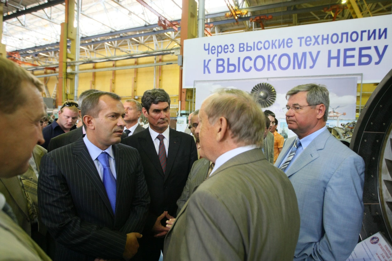 Клюев. Посещение завода «Моторсич», Запорожье, 4.06.2010